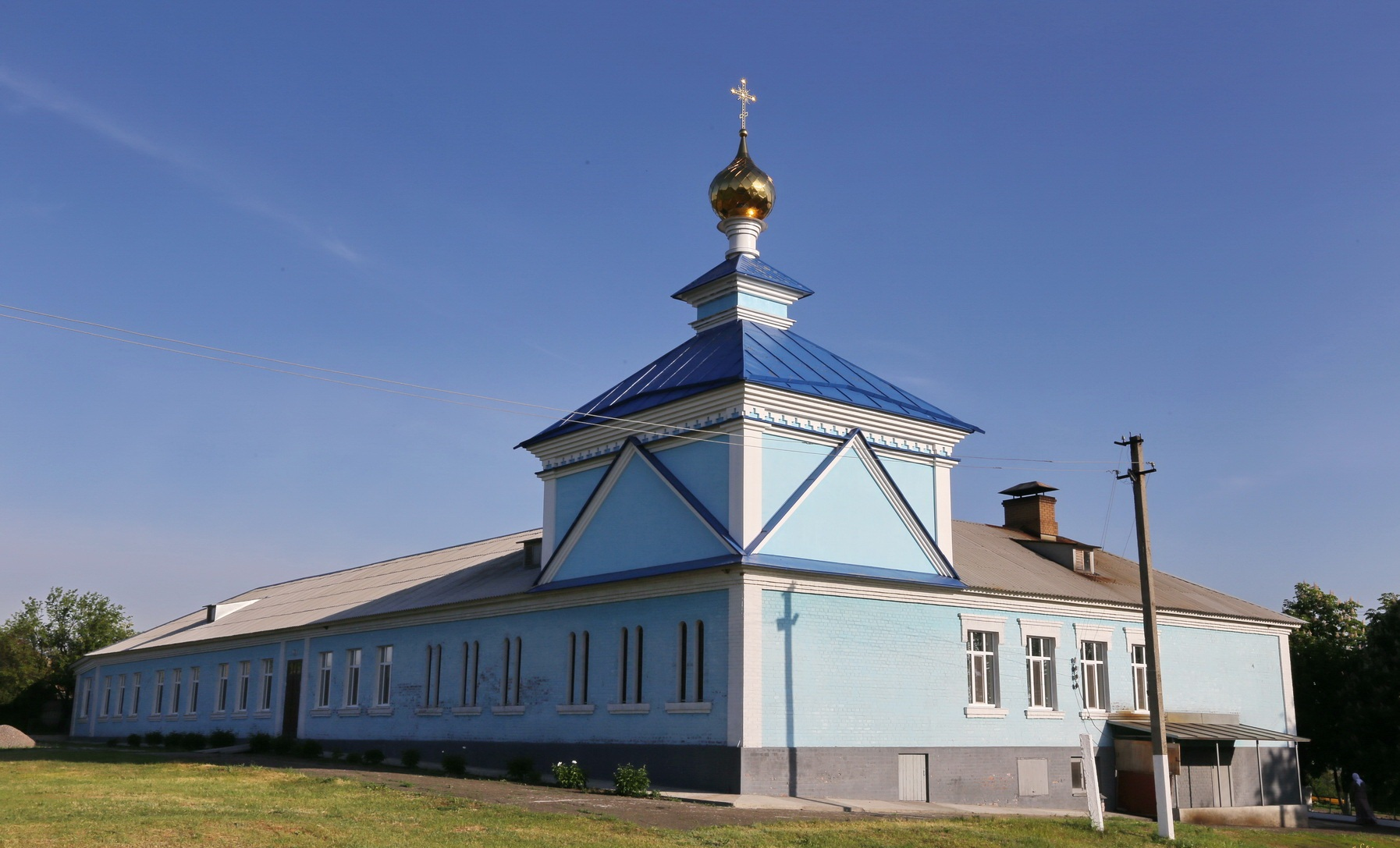 Храм Владимирской иконы Божией Матери